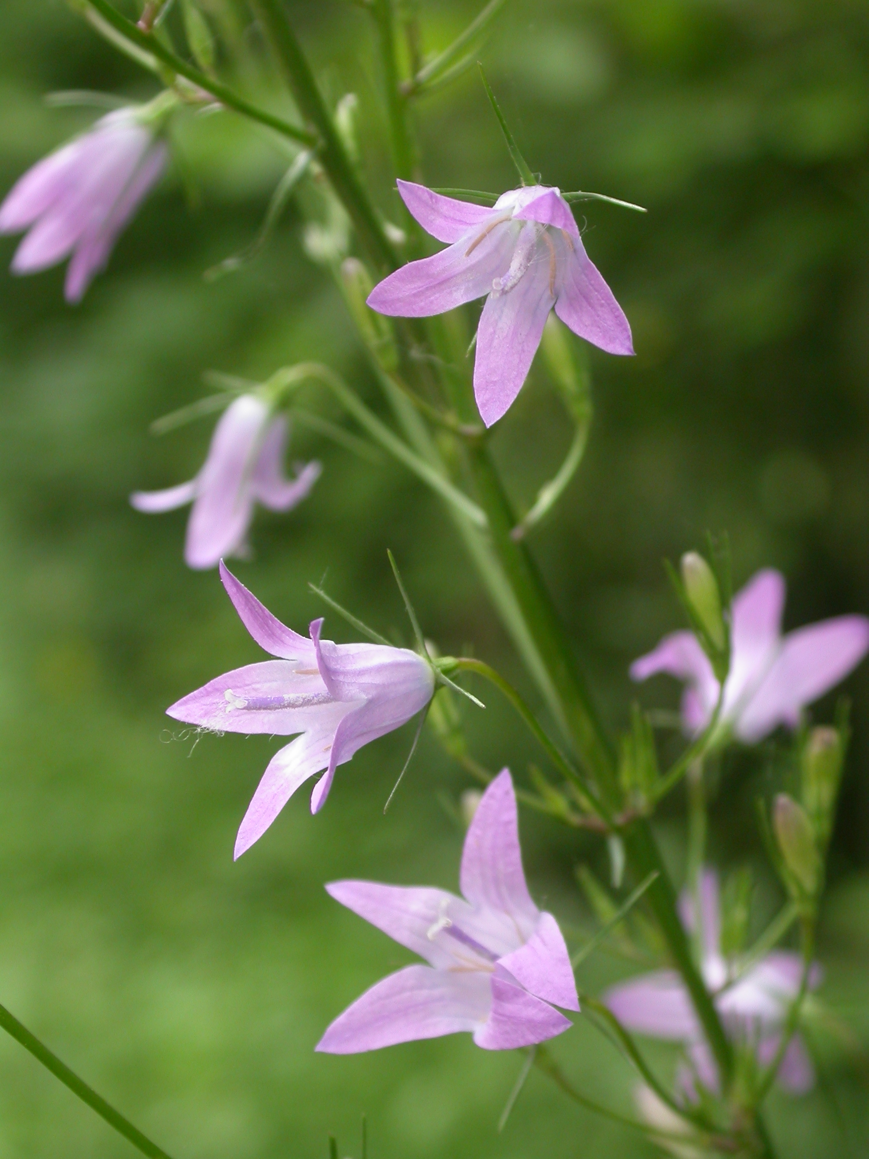 Campanula rapunculus Beuvardes (Aisne), France